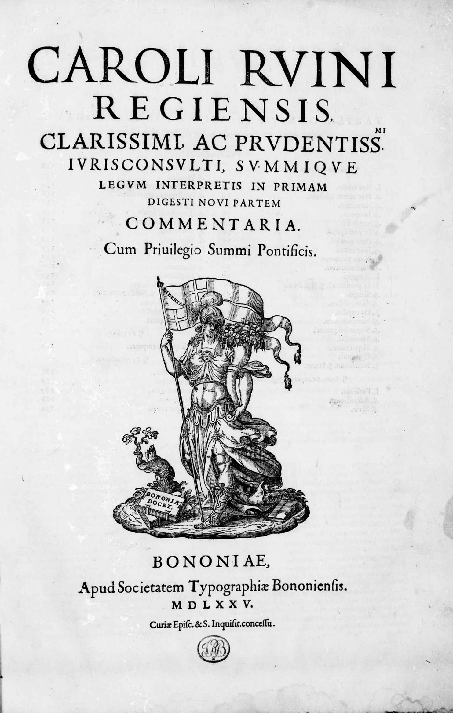 Frontespizio